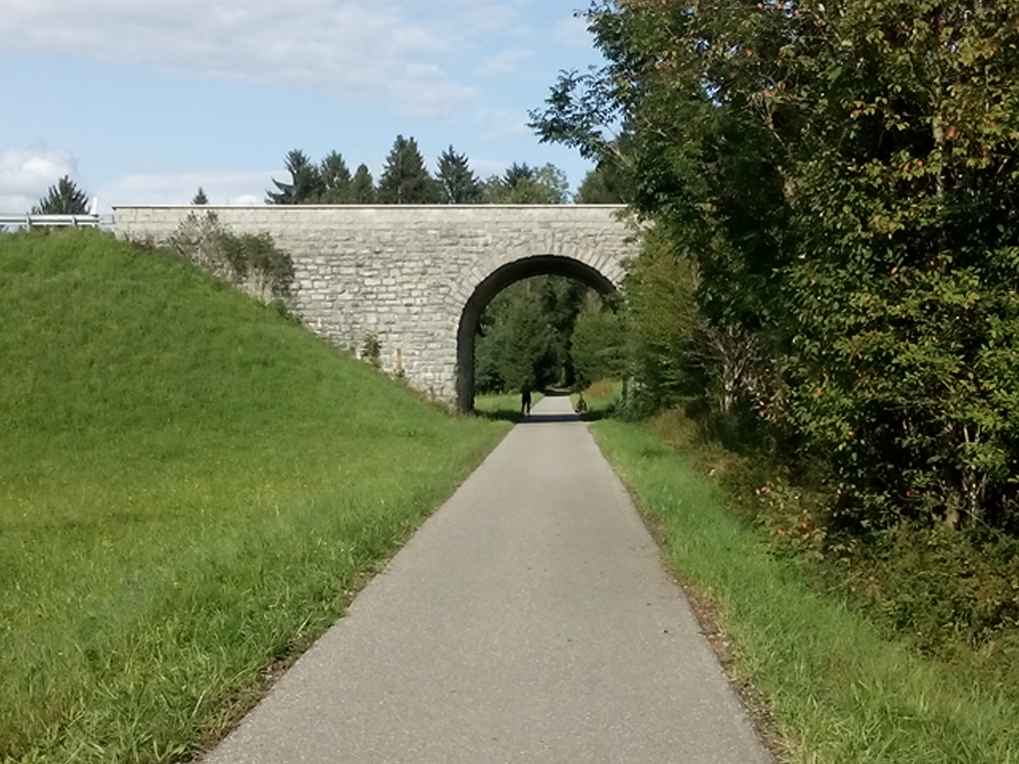 Bei der Unterführung unter der B 308 (Strecken-km 3,0)